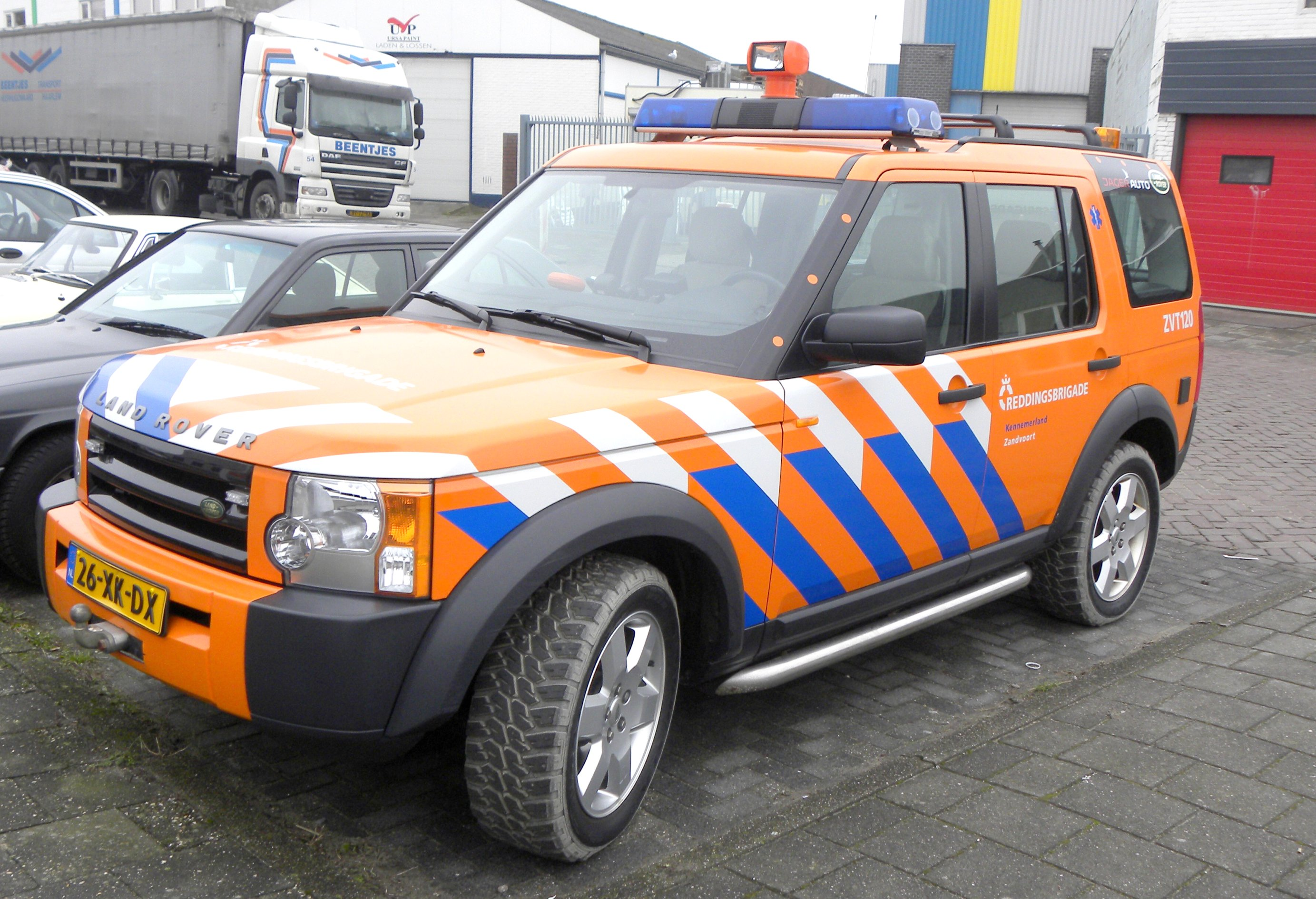 Land Rover Discovery 3 ZVT 120 Reddingsbrigade Kennemerland Zandvoort